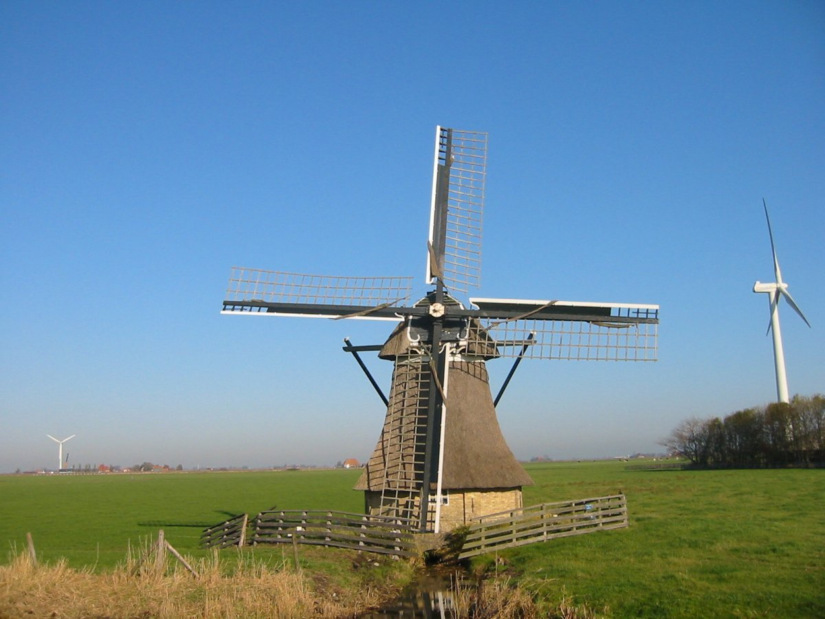 De Snip/ Ten-Bruggencatenummer: 00413: Achtkante grondzeiler van voren gefotografeerd (opmerking: Foto gemaakt in het kader van het project Actualisering Monumentenregister (AMR).)